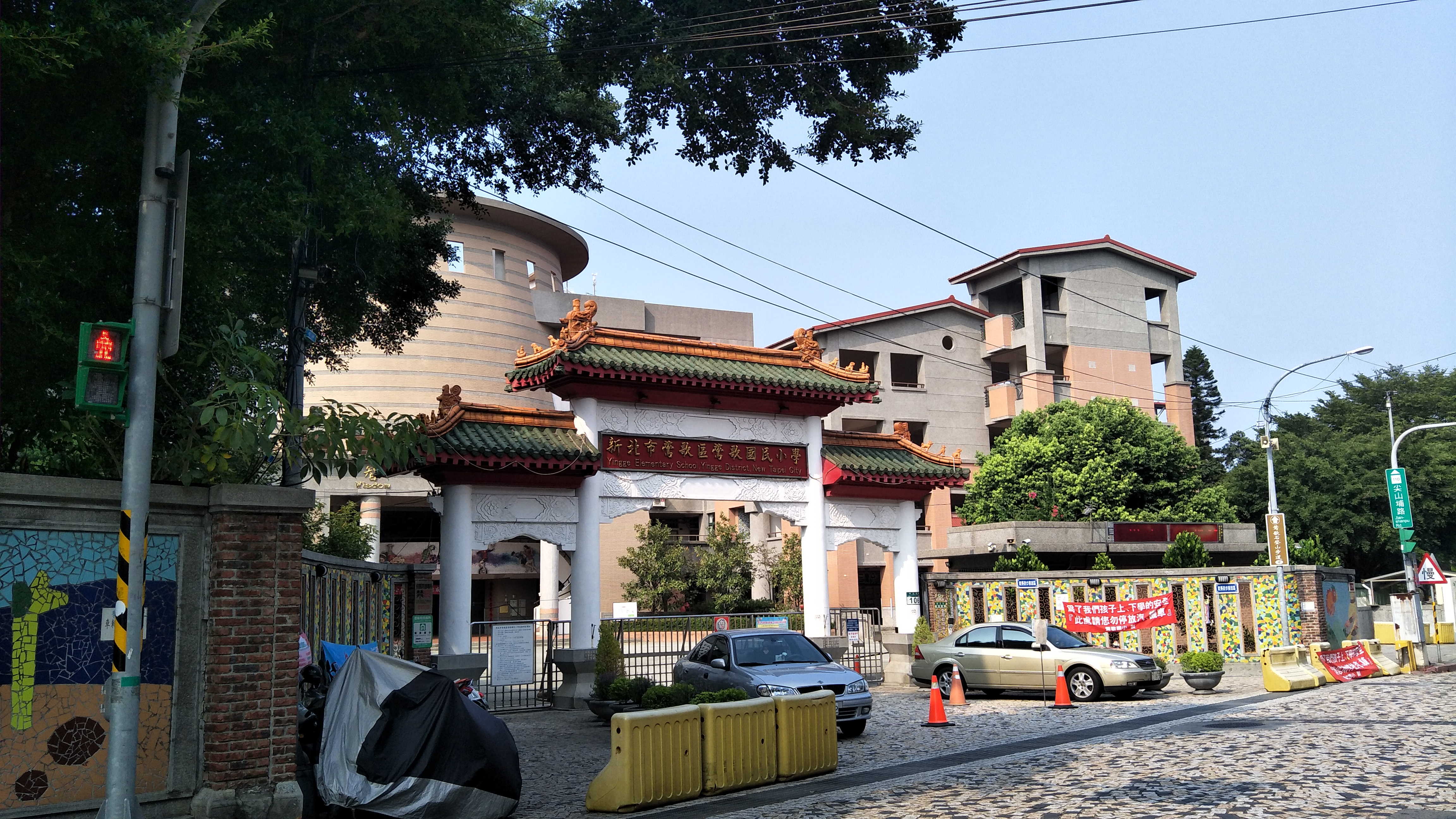 中文（台灣）: 新北市鶯歌區鶯歌國民小學